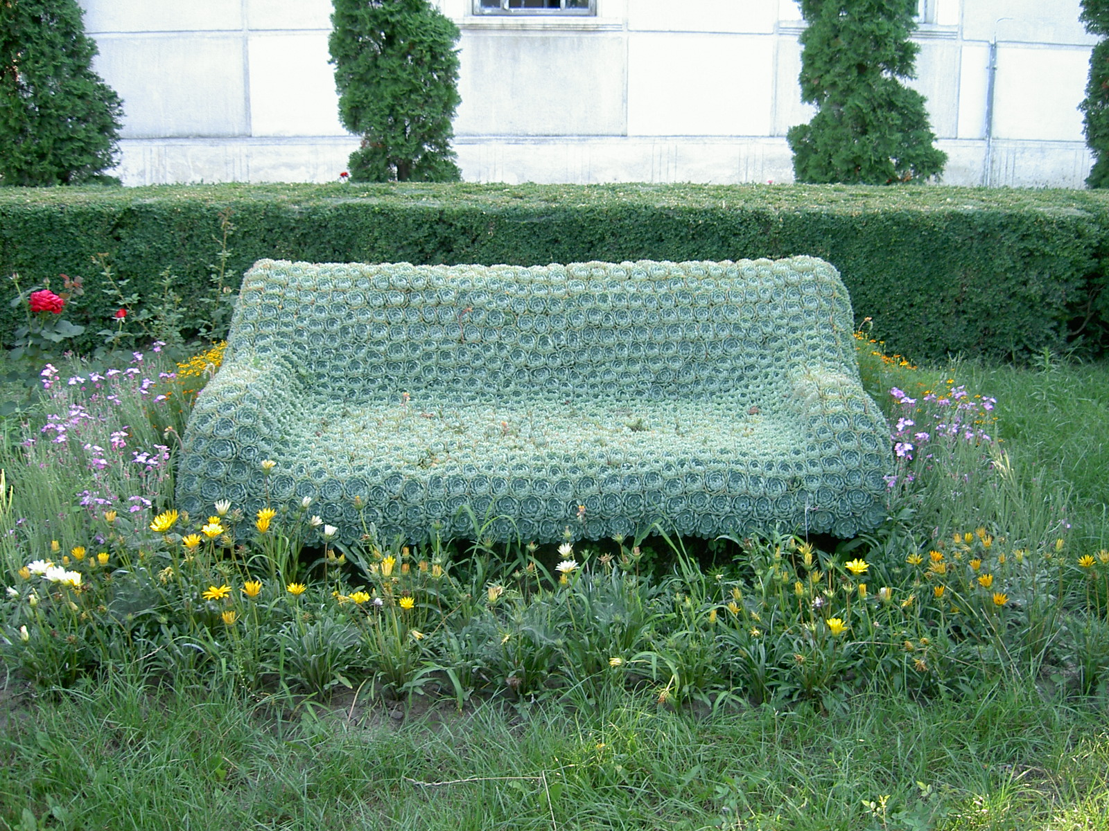 Bancă în faţa Primăriei Darabani.